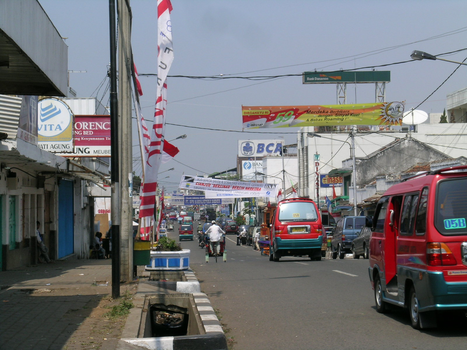 Arief Rustomo